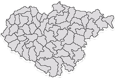 Categorie:Hărţi ale judeţului Sălaj